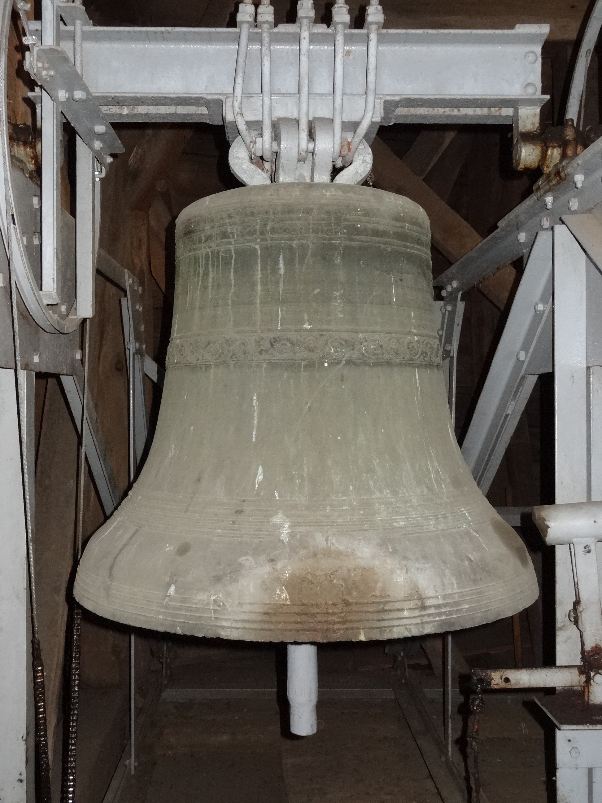 Evangelische Pfarrkirche (Gambach), kleine Glocke